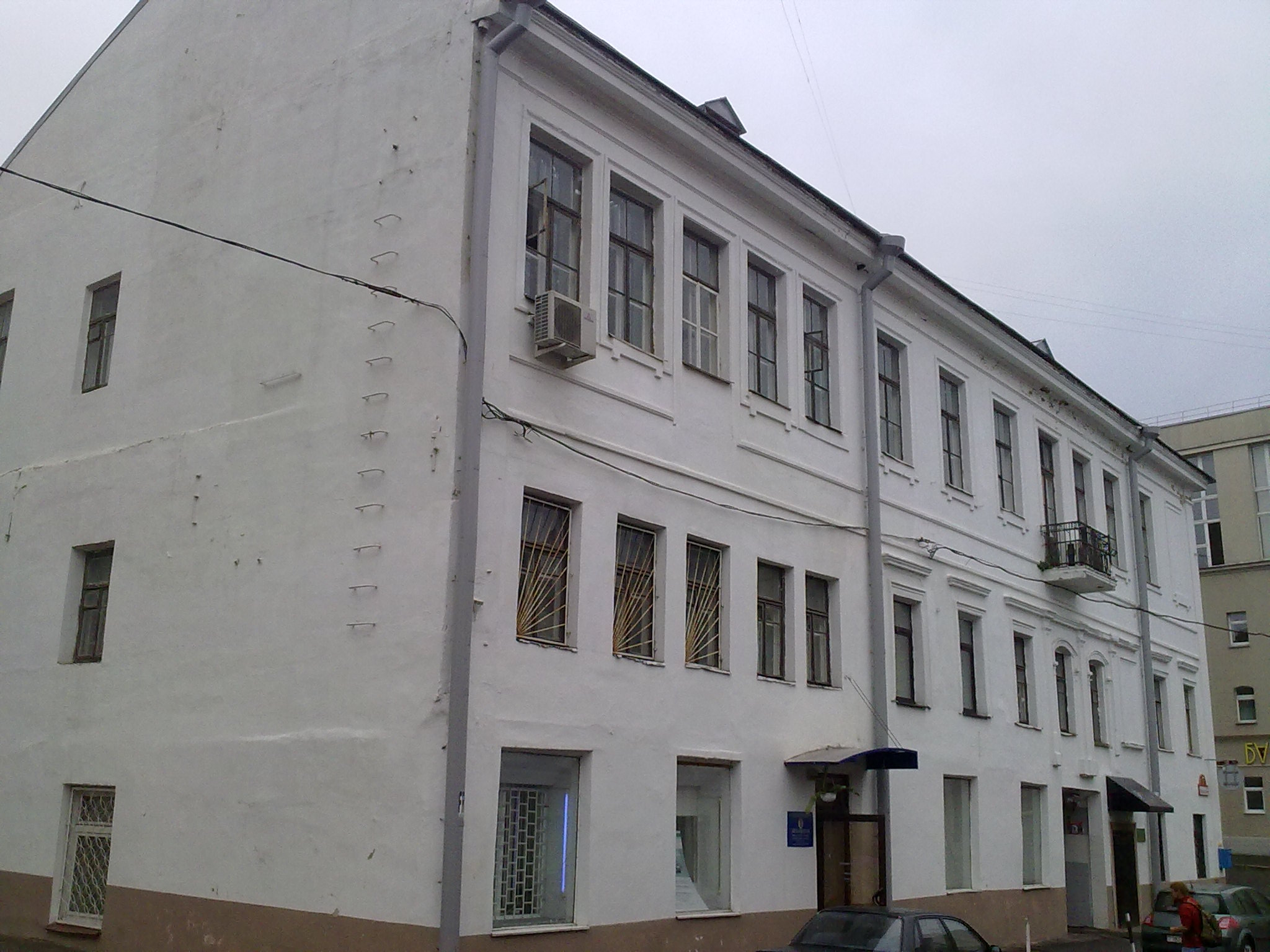 Мінск. Вуліца Рэвалюцыйная. 2012